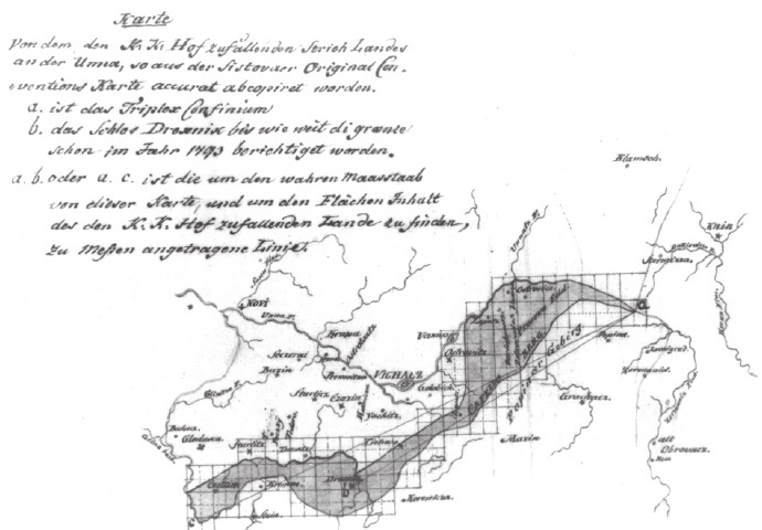 Српски (ћирилица): Територије које су припојене Војној крајини након Свиштовског мира